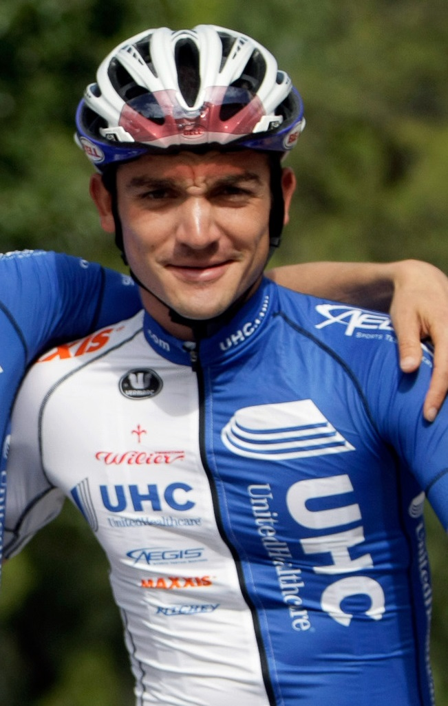 Isaac Bolivar con el maillot del unitedhealthcare en el Tour de San Luis 2014.